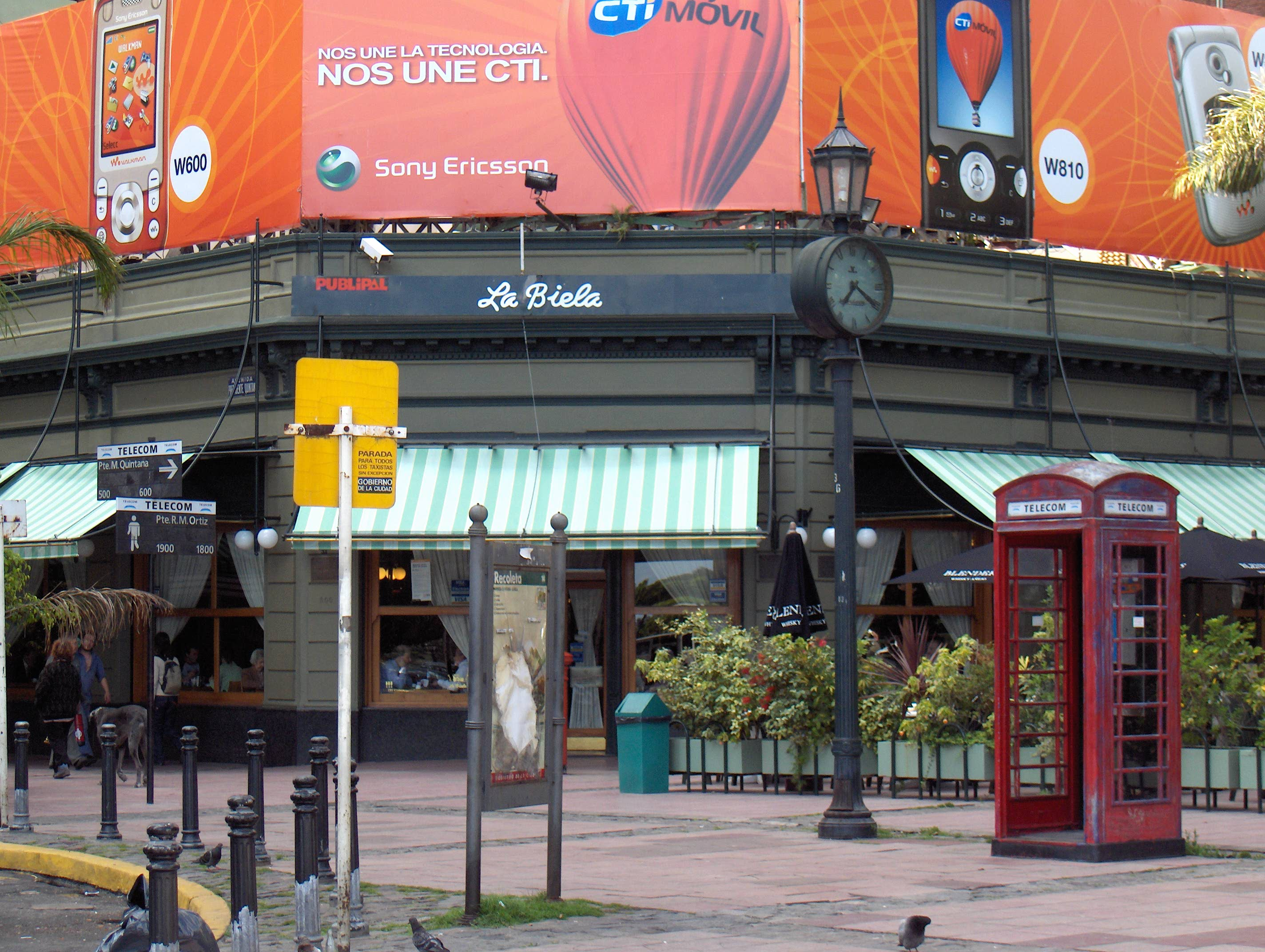 Café La Biela, en el barrio de Recoleta. Ciudad de Buenos Aires